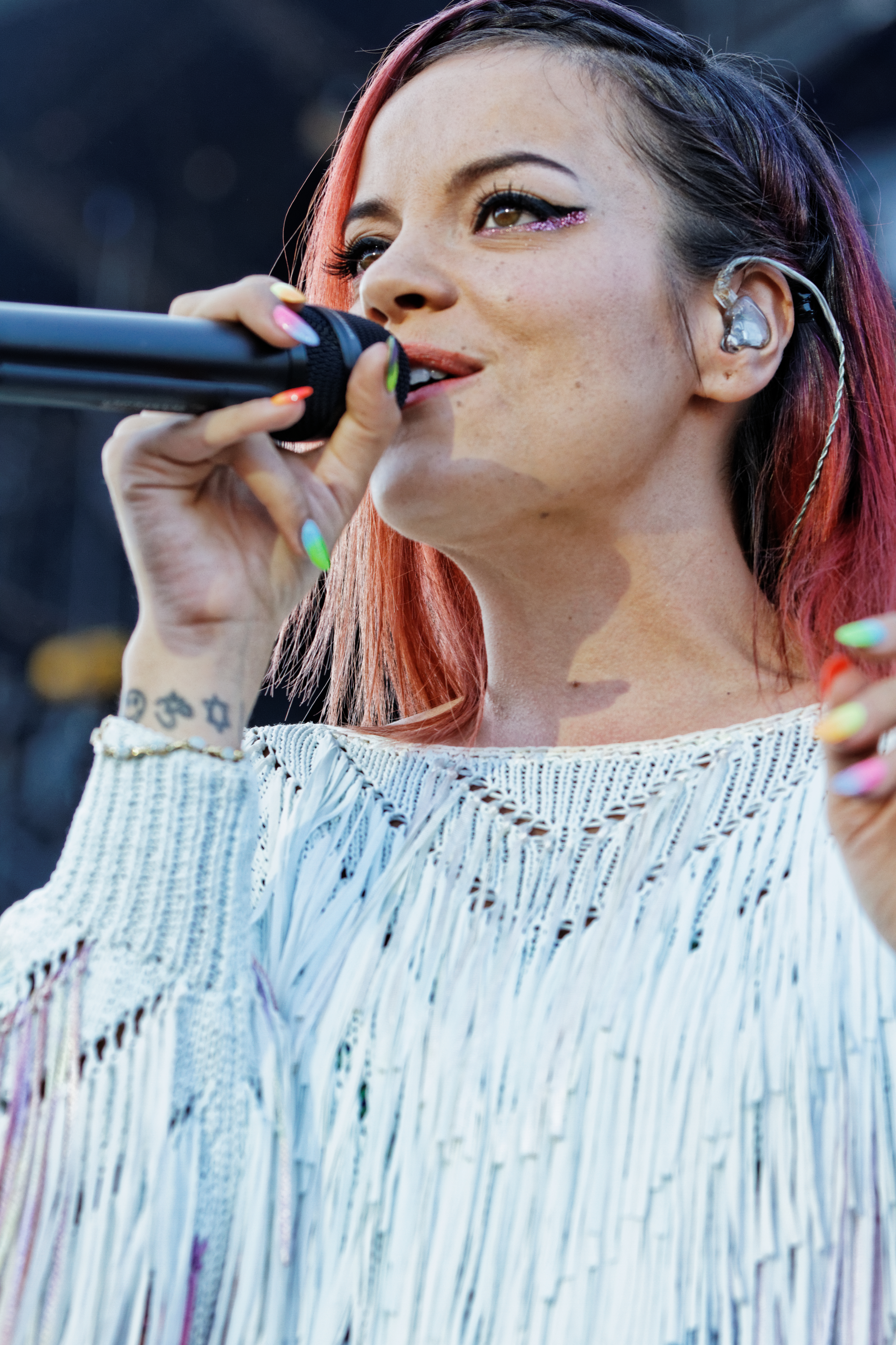 Lily Allen en concert sur la scène Glenmor lors du festival des Vieilles Charrues 2014.